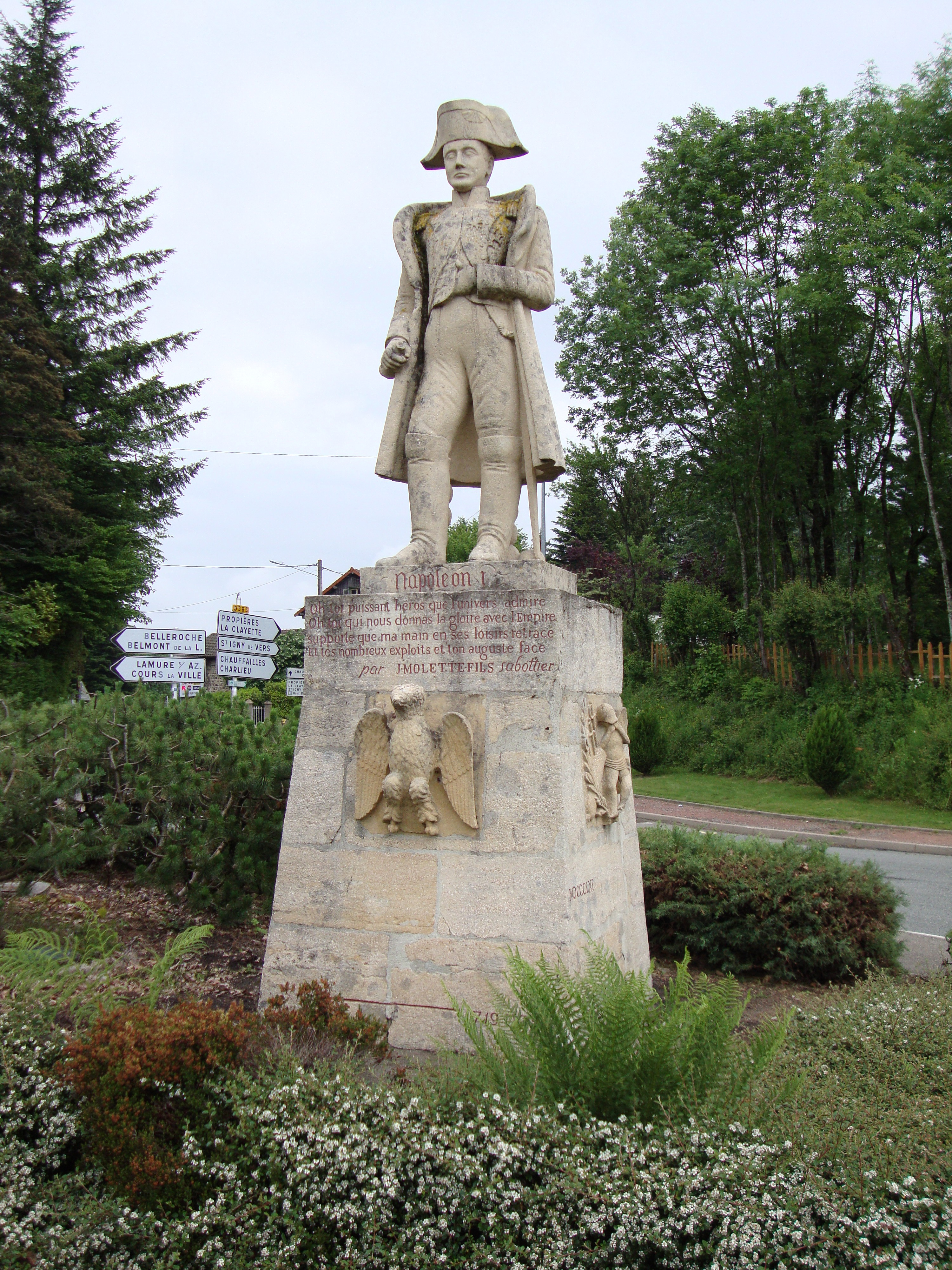 Poule-les-Écharmaux (Rhône, Fr) statue Napoléon I sur le Col des Écharmeaux.